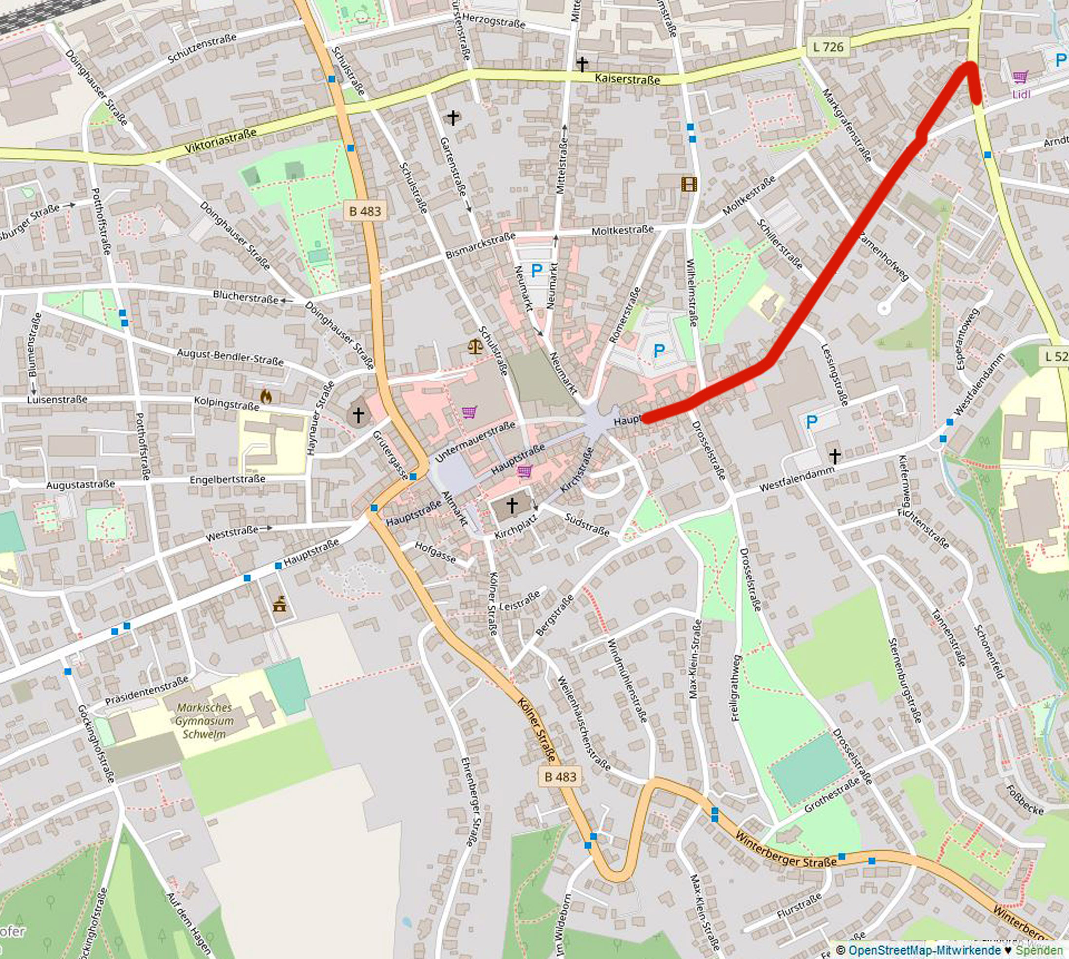 Lage von Bau- und Bodendenkmälern in Schwelm, rot markiert der Bereich Hauptstraße (östlicher Teil) und Möllenkotter Straße. Kartenvorlage aus OpenStreetMap wurde um Markierung (rot) ergänzt.